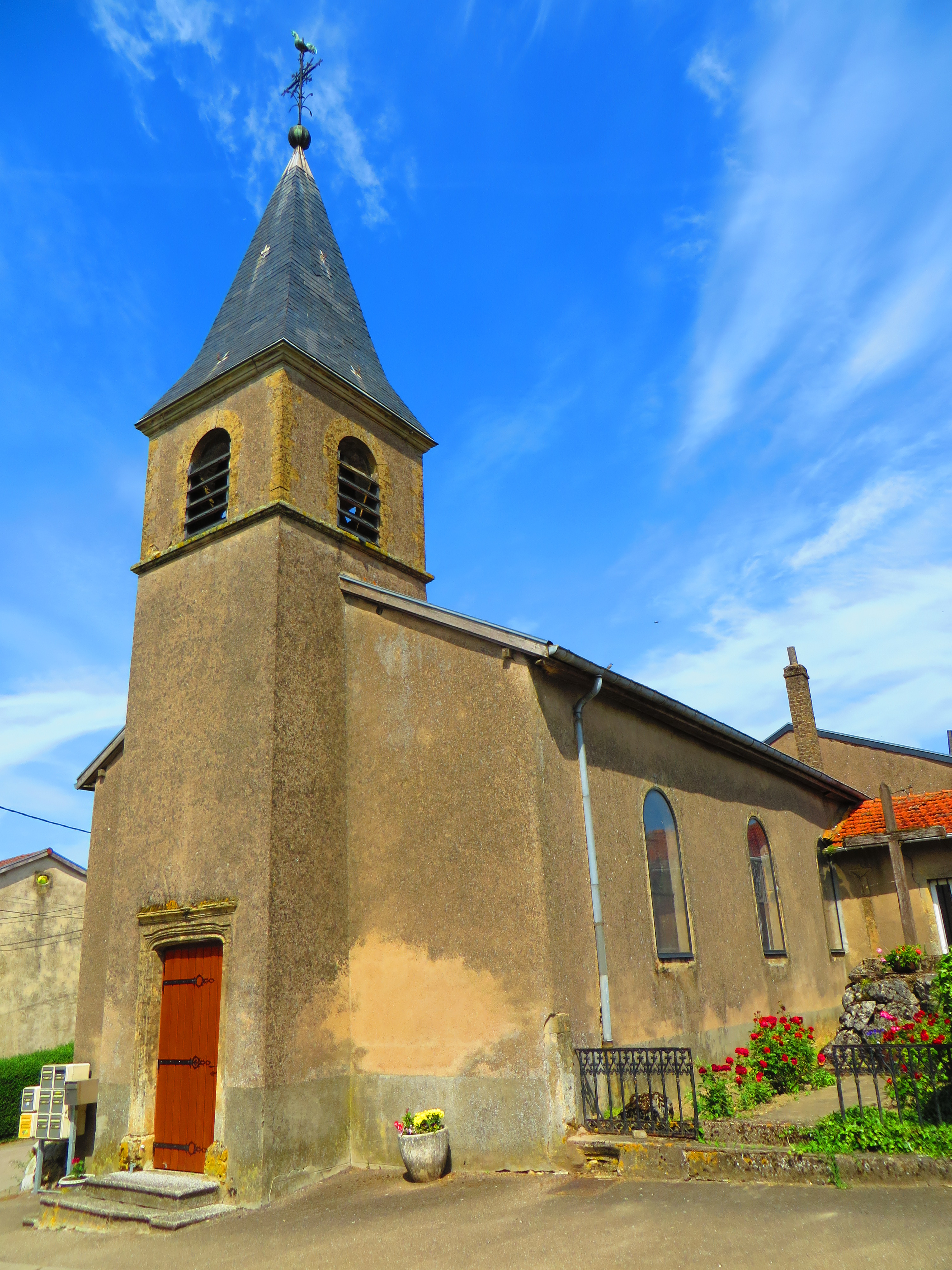 Brouck eglise